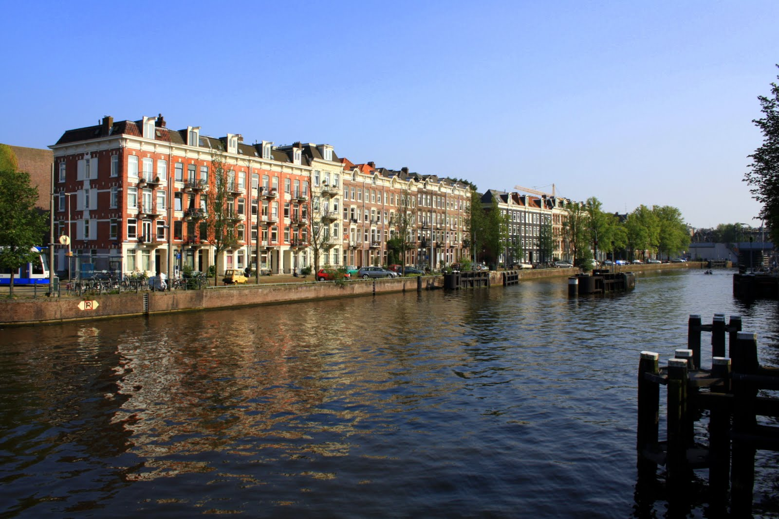 Westerkanaal Amsterdam, met zicht op de oostelijke Houtmankade bij de ingang van de Zoutkeetsgracht